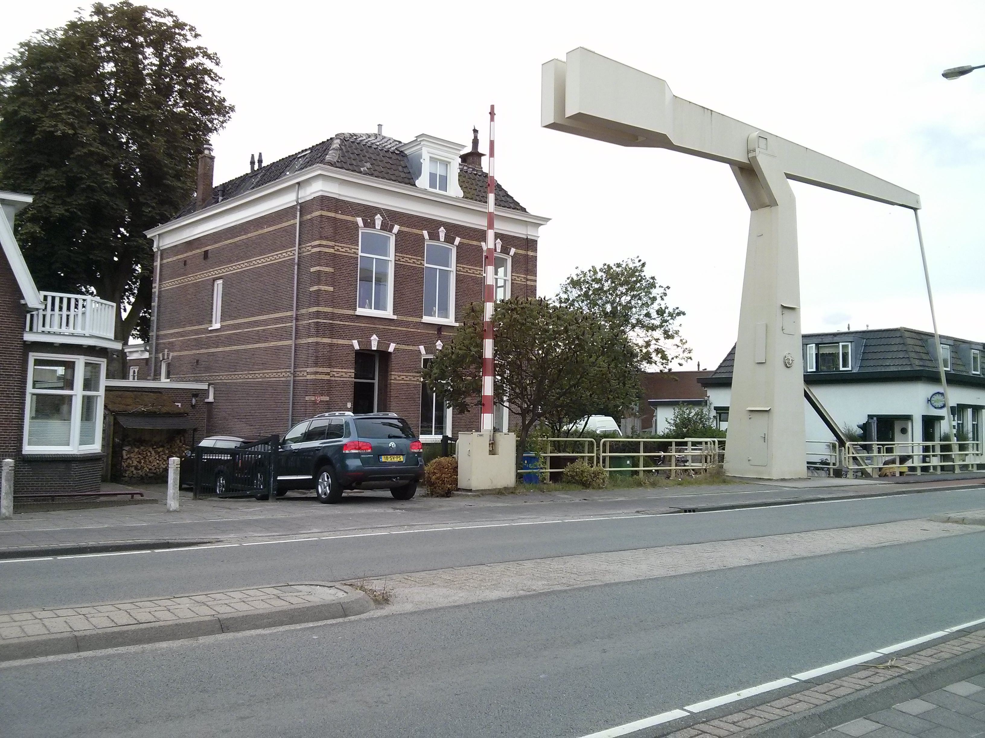 Woonhuis/herenhuis